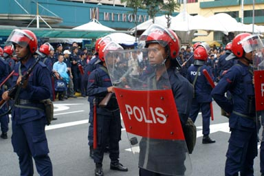 Anggota Pasukan Simpanan Persekutuan (PSP) atau FRU dalam perbarisan. Perhatikan raifal Lee Enfield Mk.5 yang pernah digunakan semasa Perang Dunia Kedua dan Darurat 1948-1960 serta Konfrontasi Malaysia-Indonesia.